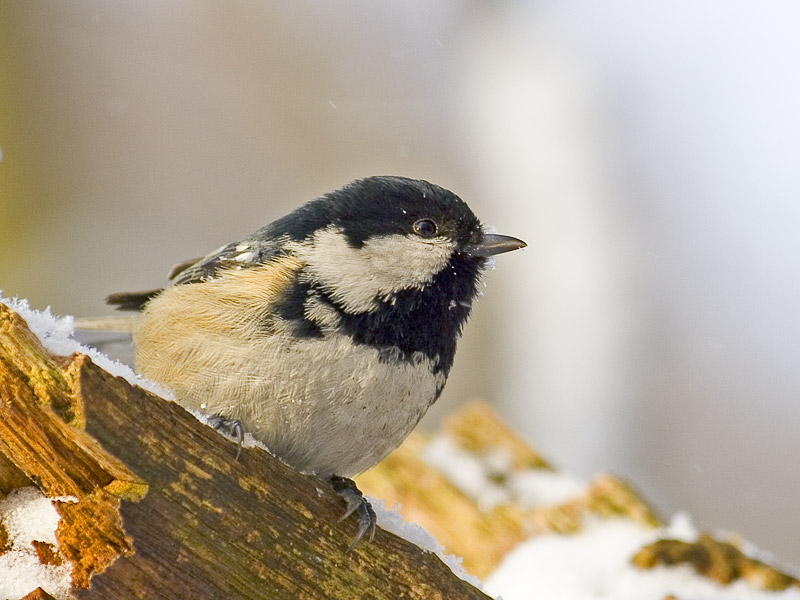 Periparus ater, Poland